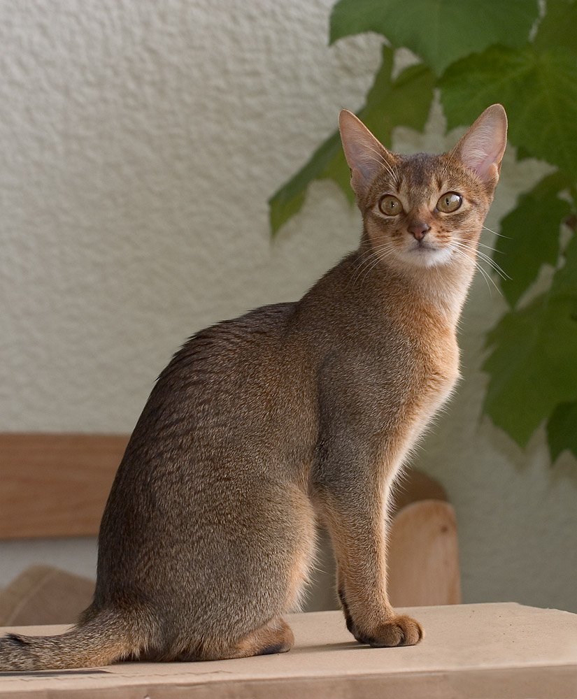 Gatobelo's Kamée, Abessinier wildfarben